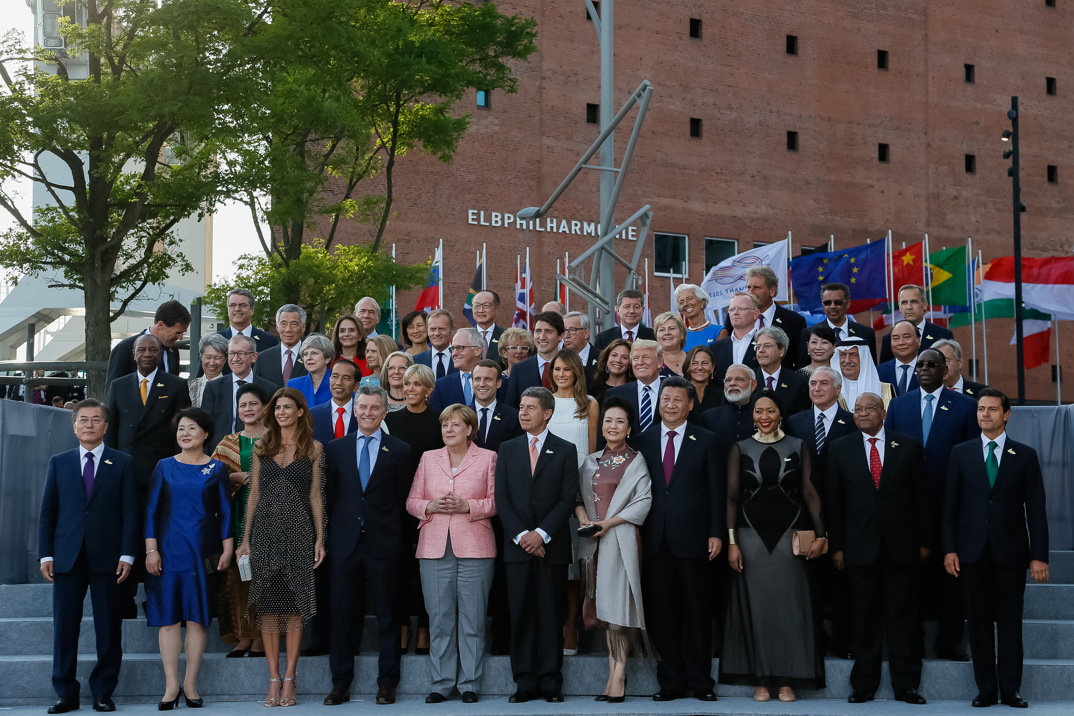 (Hamburgo - Alemanha, 07/07/2017) Foto de família. Foto: Beto Barata/PR